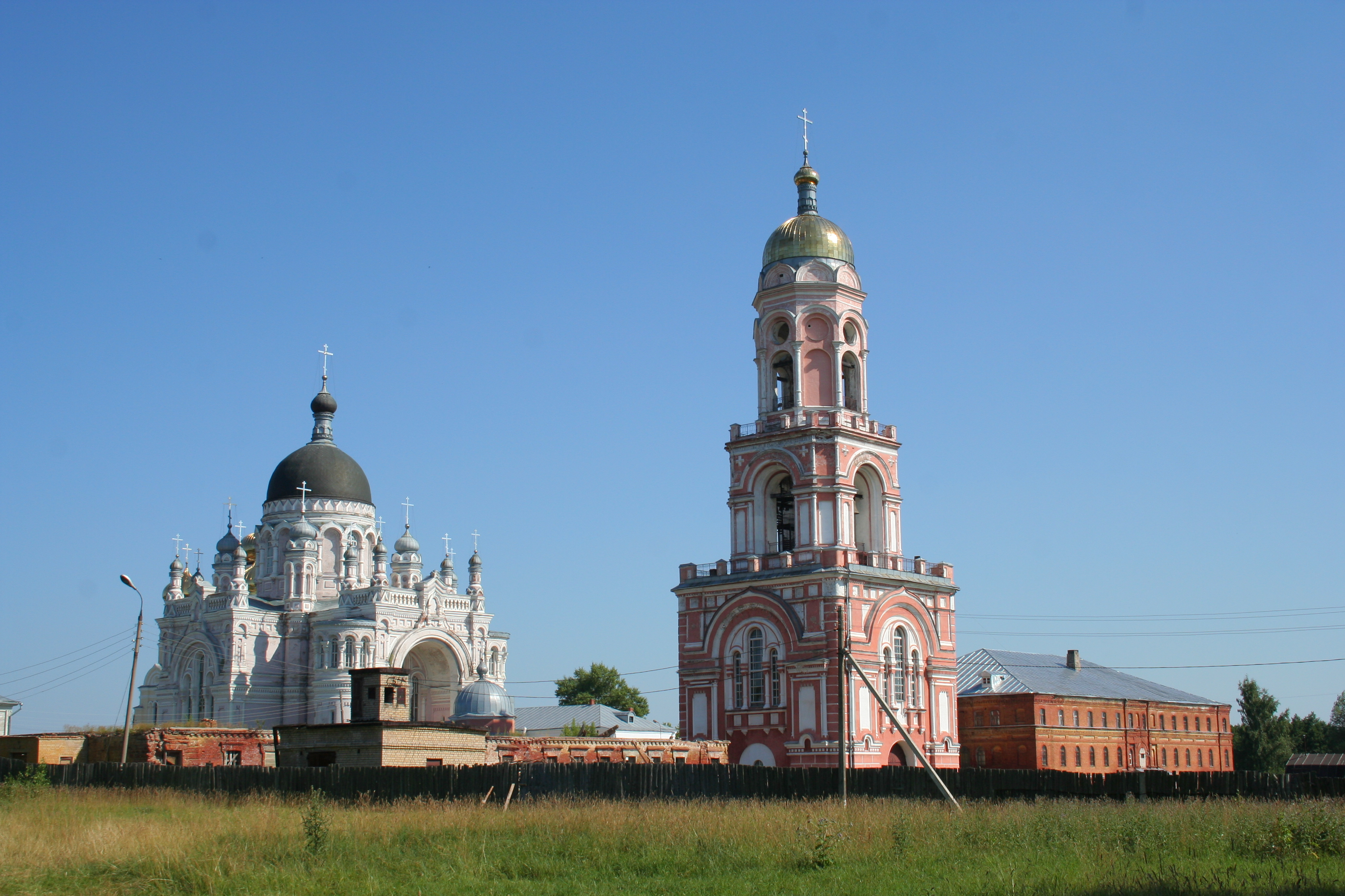 Ansichten der Stadt Wyschni Wolotschok (Oblast Twer, Russland). Kasaner Kloster.